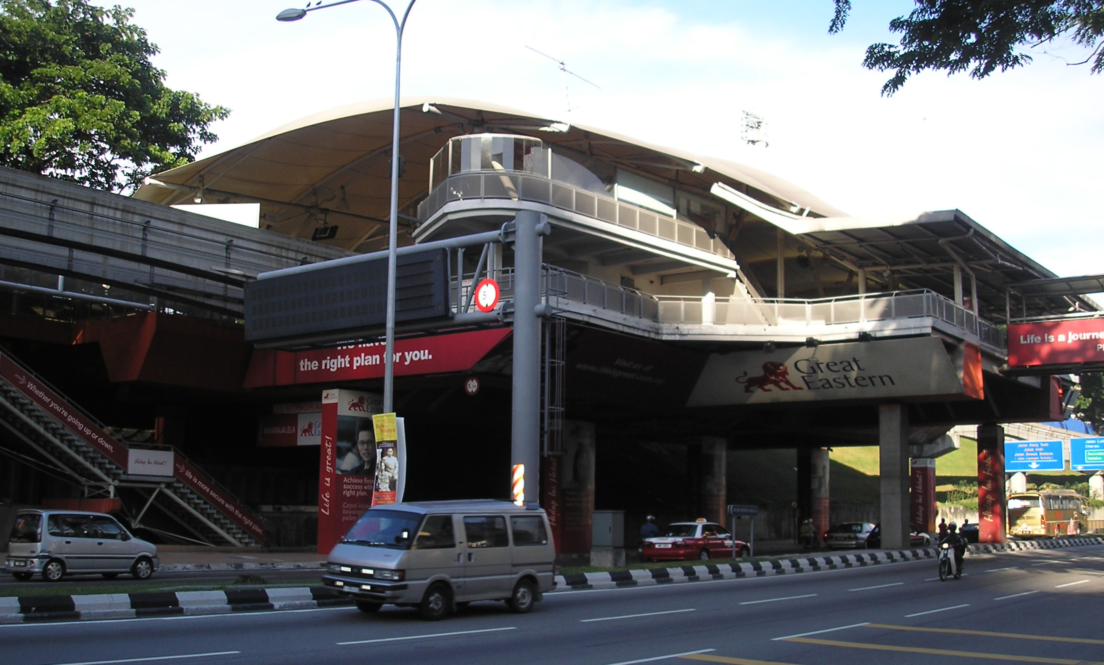 The Maharajalela station (Kuala Lumpur Monorail) (exterior), Kuala Lumpur, Malaysia.